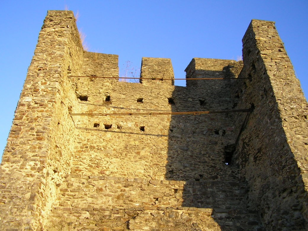 Wehrturm der Burg Dasburg. Gut zu erkennen die einzelnen Aussparungen der in der Vergangenheit evtl. vorhandenen Holzbalken.